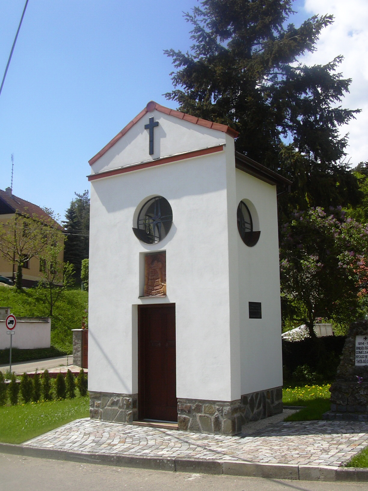 zvonička Radslavičky (Vyškov District - Czech republic)